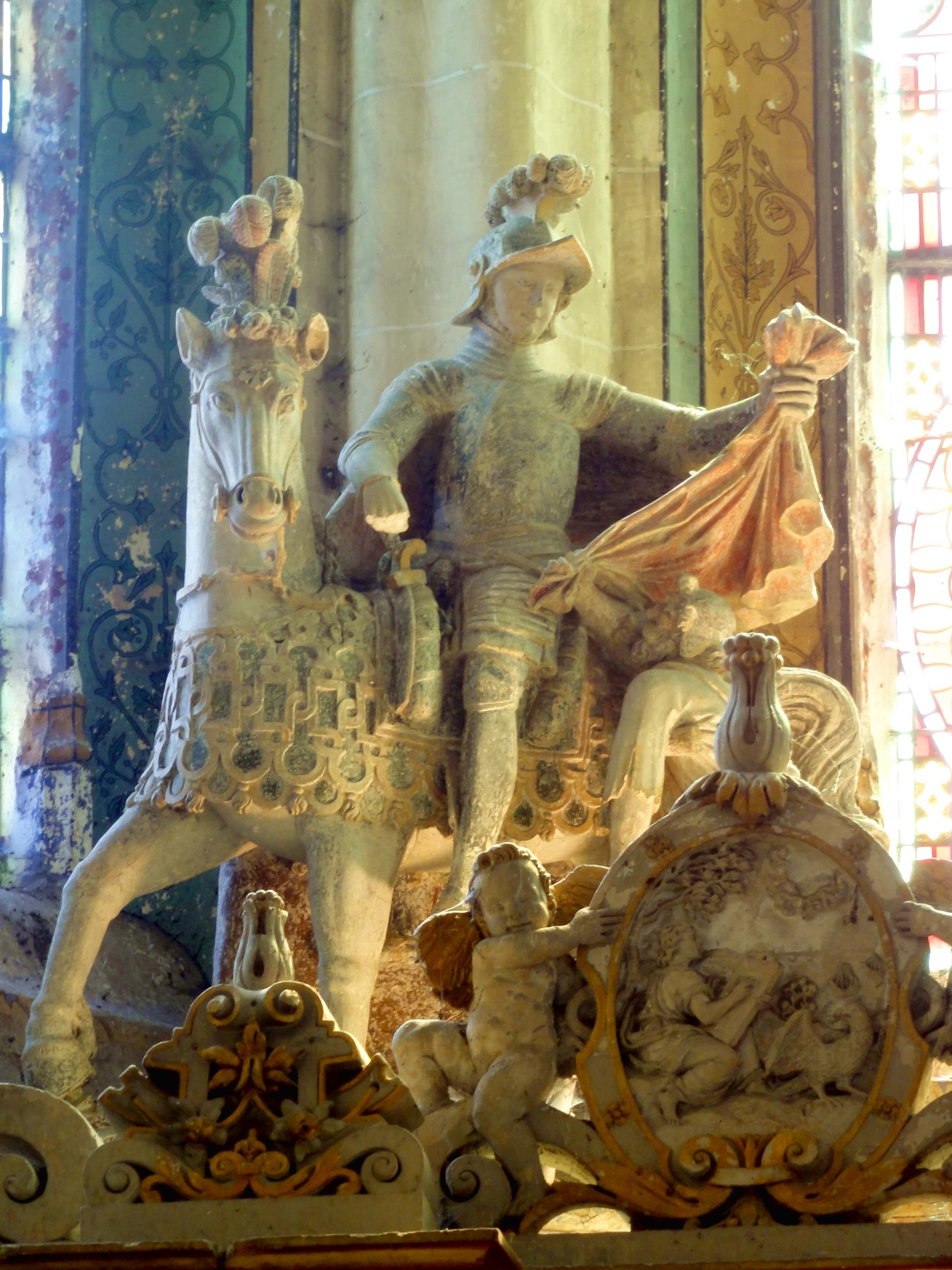 Charité de Saint-Martin.